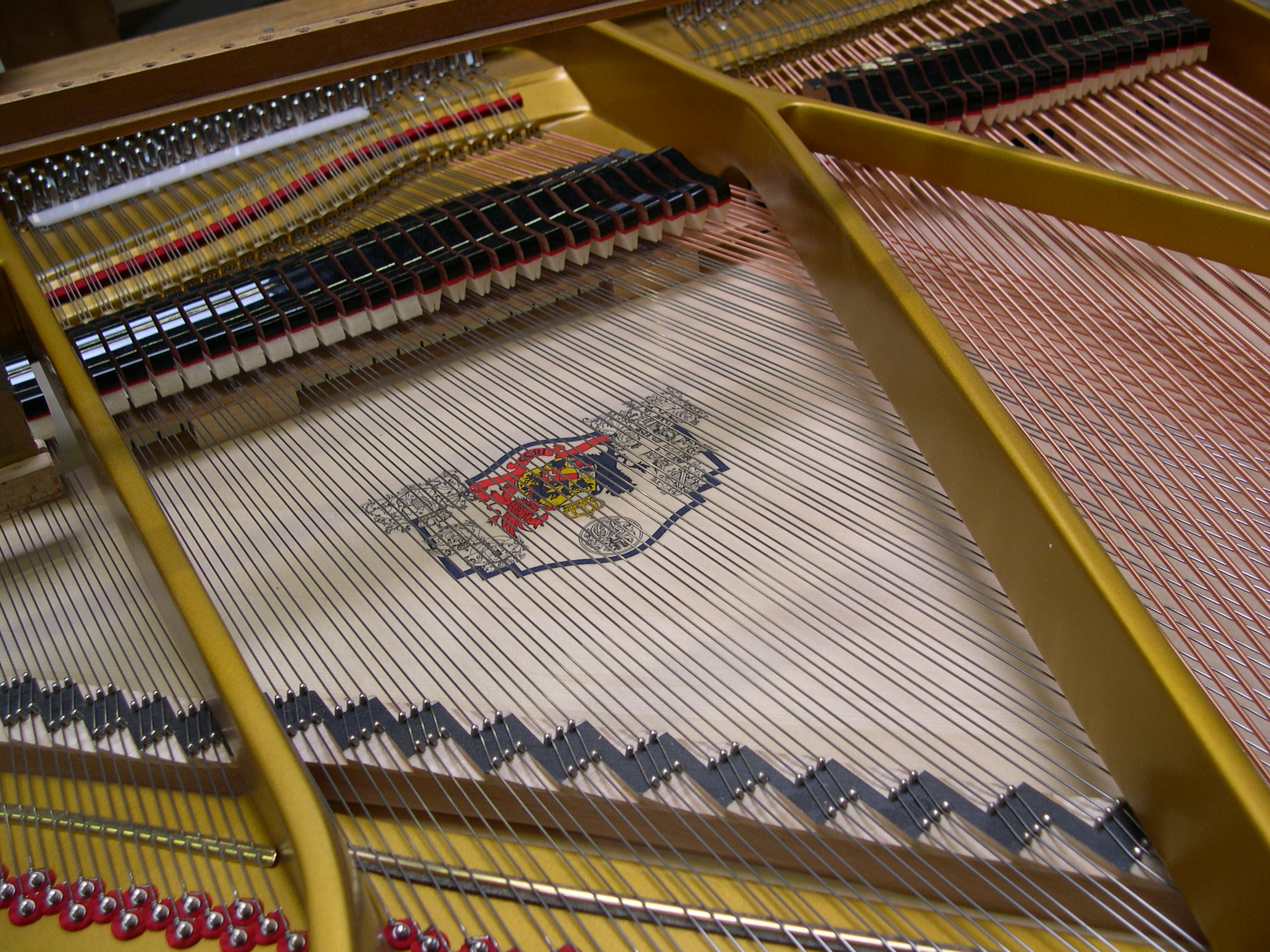 Innenansicht eines Flügels der Firma Grotrian